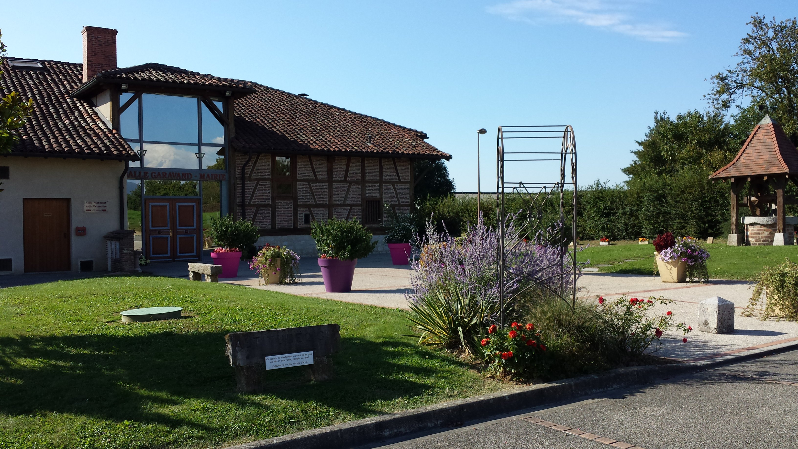 Mairie de Bény, Ain